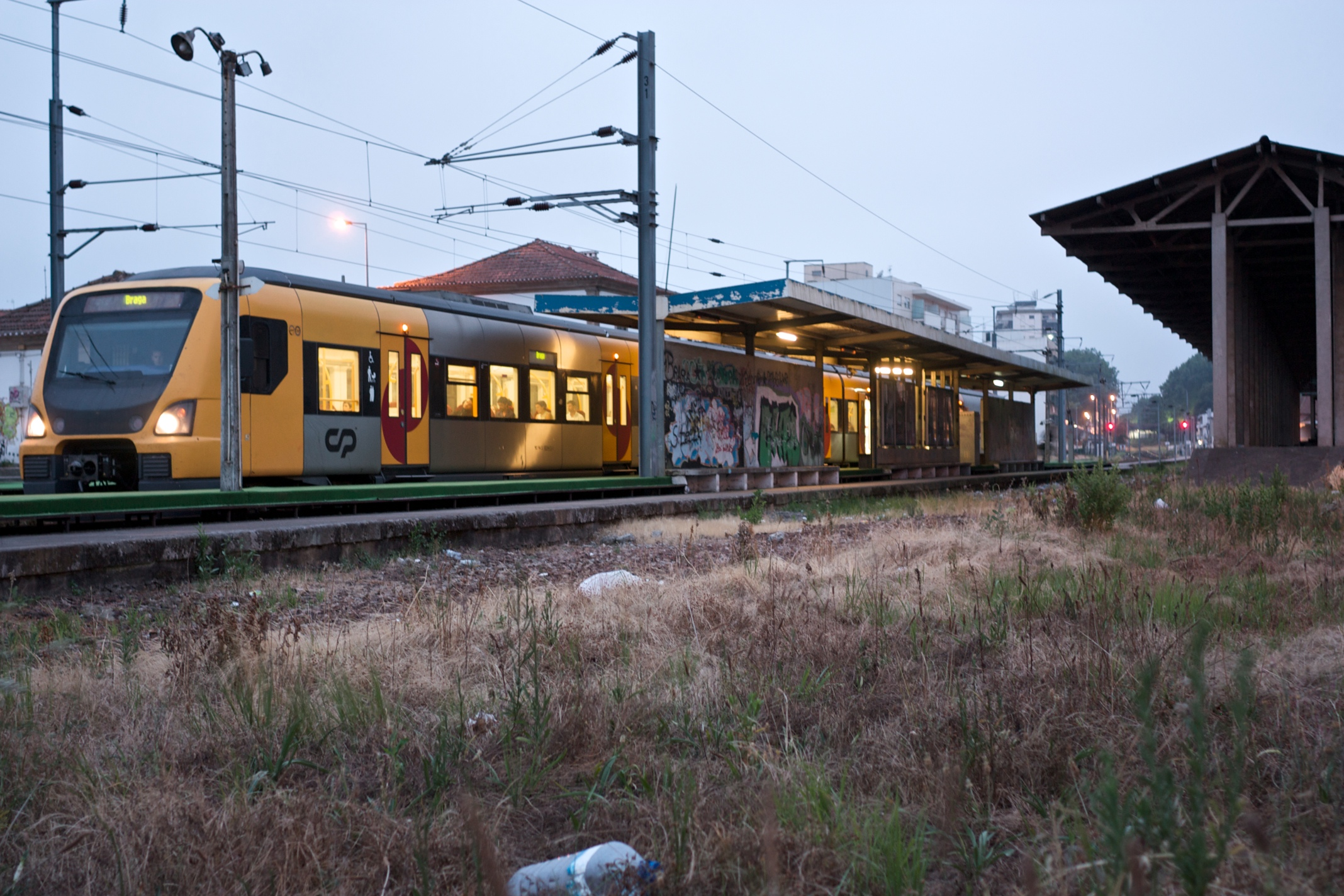 Tipo: Comboio Urbano 15247 [Porto • São Bento - Braga] Local: ex-Estação da Trofa [Linha do Minho, PK 22 • Linha de Guimarães (Via Estreita), PK 26] Data e hora: 8 de Julho de 2010 [21h18] Material: Automotora 34xx [Unidade Múltipla Eléctrica]